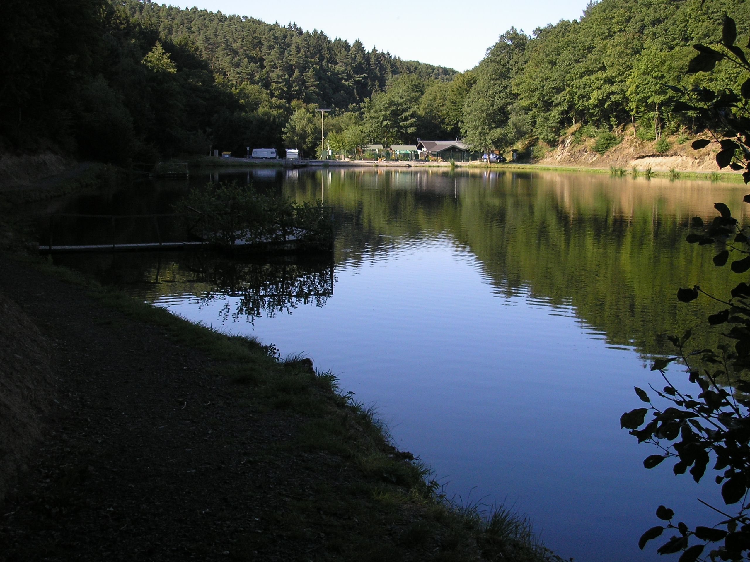 Obersteinebach, VG Flammersfeld, Stausee